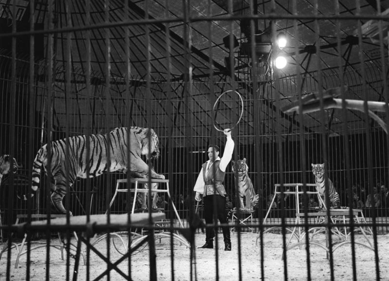 Zirkus Krone Raubtierdressur Gilbert Horike mit Königstigern